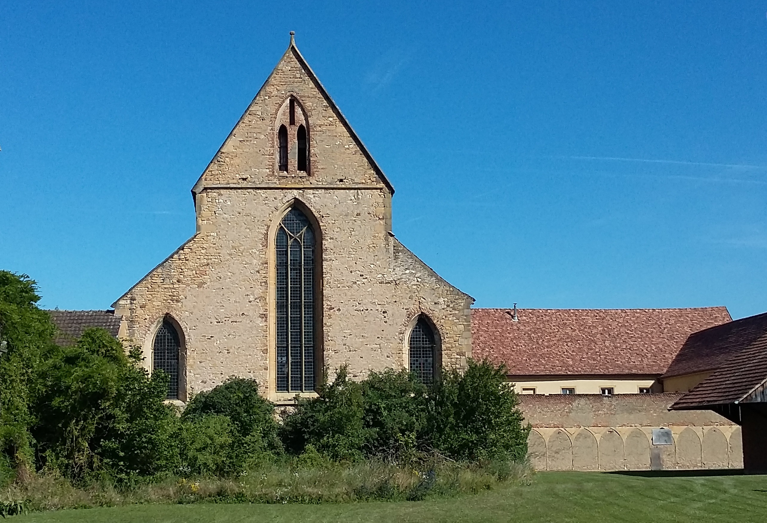 Alsace, Haut-Rhin, Rouffach, Ancien Couvent de franciscains, des Récollets, Église Ste Catherine pignon Ouest.